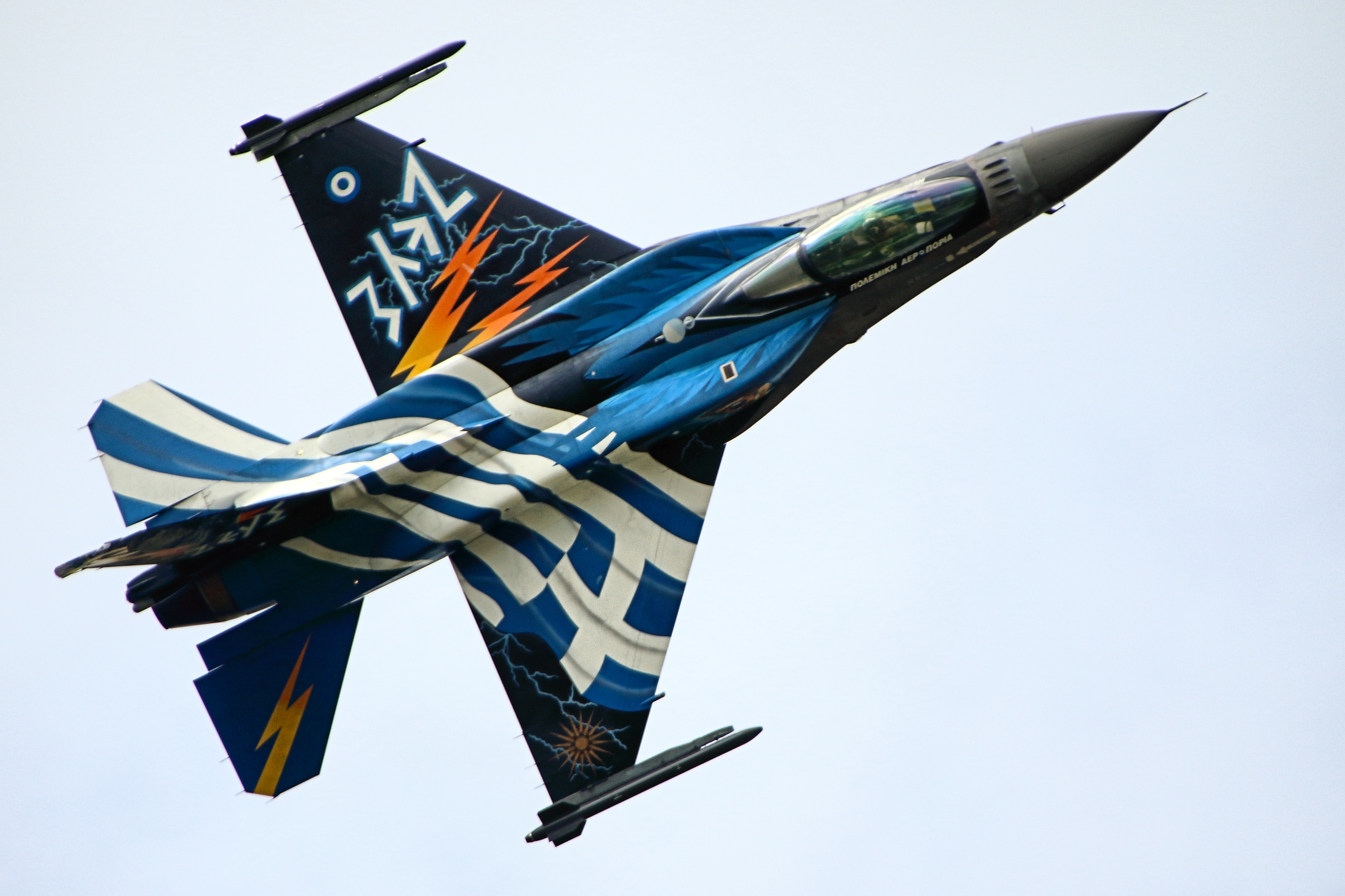 F-16 - RIAT 2016